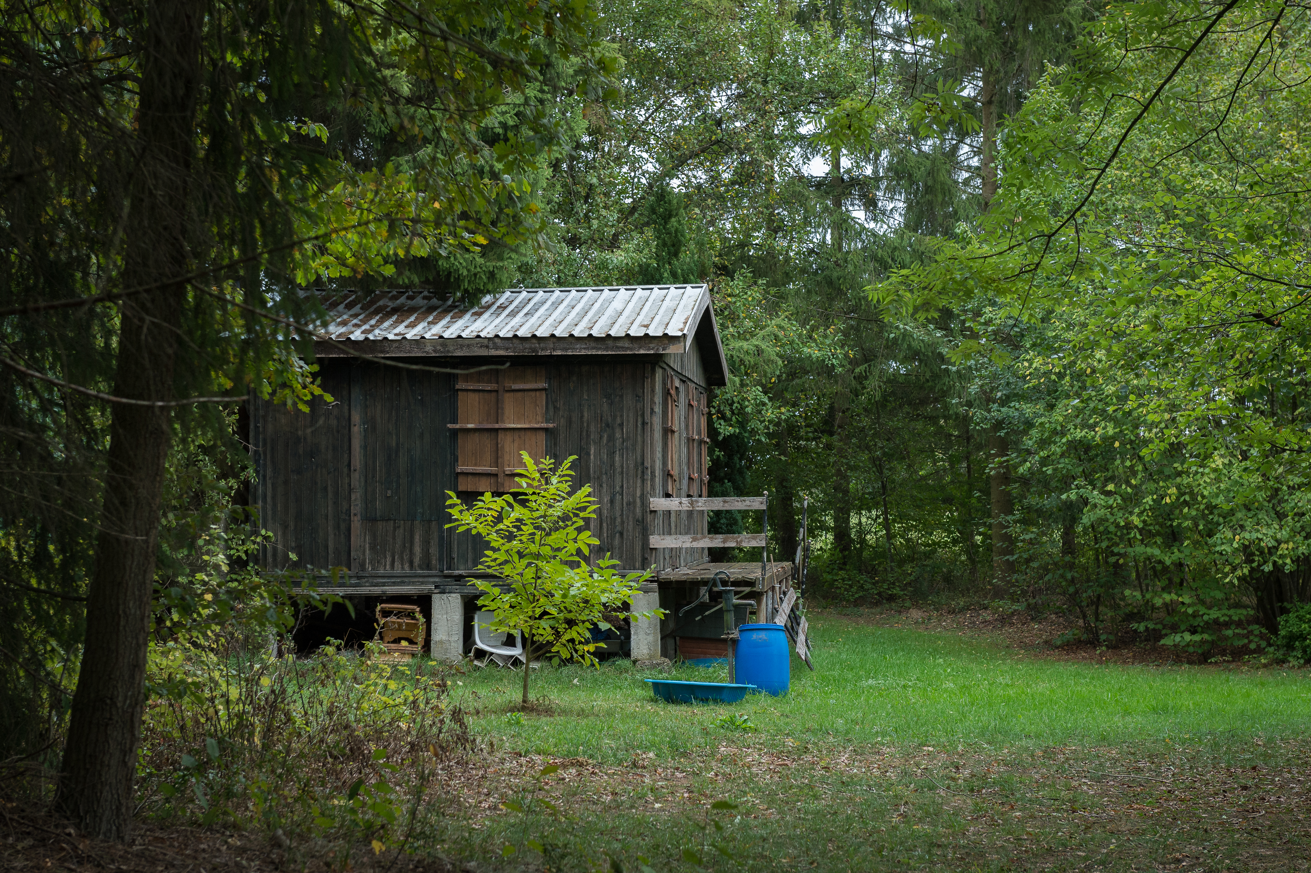 Die Hütte an einem Fischteich bei Griesingen, in der Meike und Lars Schlecker in der Nacht vom 22. auf 23. Dezember 1987 von Entführern festgehalten wurden.